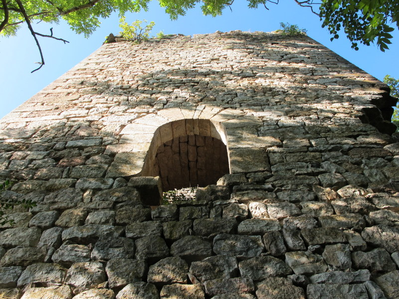 Torre Cavallera - Camprodon a la comarca del Ripollès - Catalunya